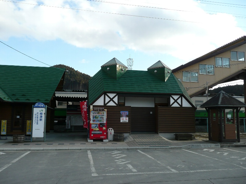 Yanaizu station